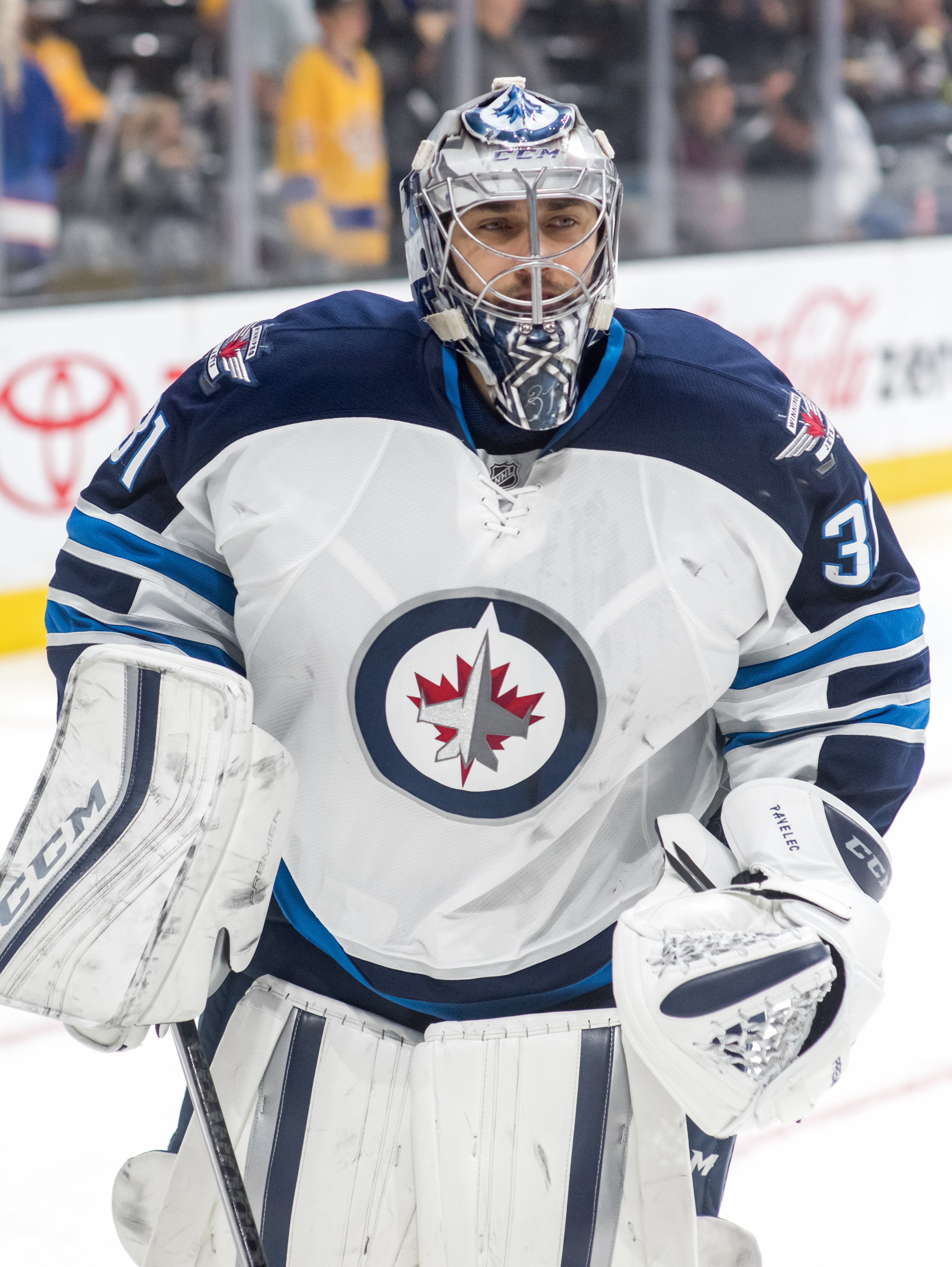 Ondrej Pavelec (Ondřej Pavelec)